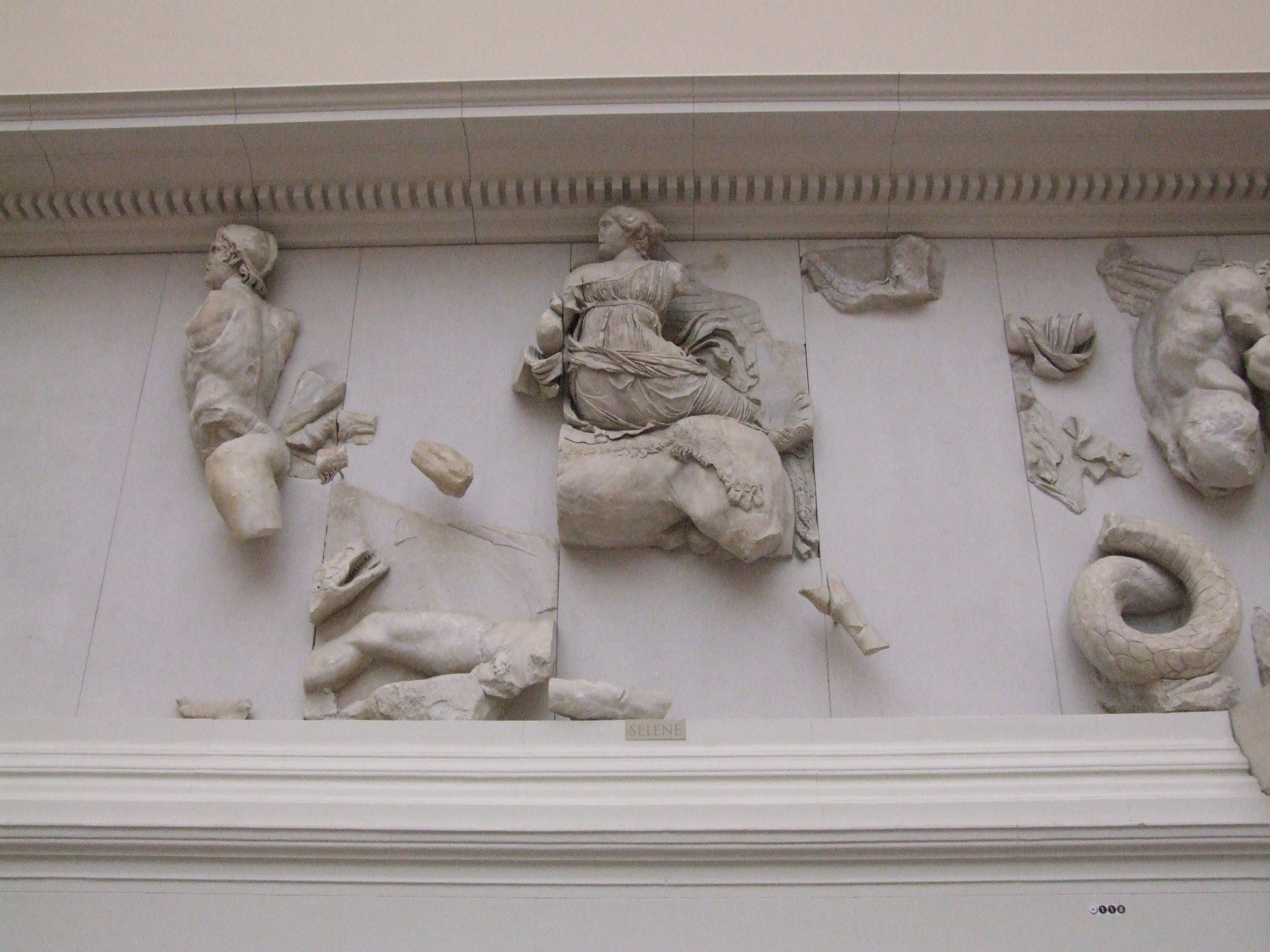 Pergamonmuseum Berlin, Pergamonaltar, Gigantomachie, Selene